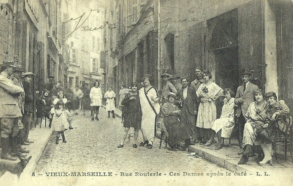 La Rue Bouterie à Marseille.